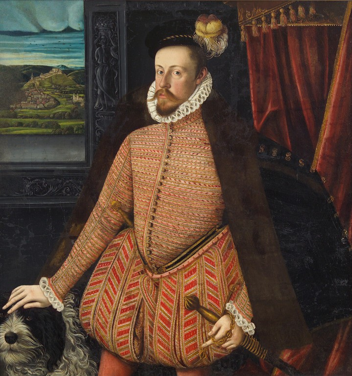 Duque Carlos II de Estiria, Archiduque de Austria. Hijo del Emperador del Sacro Imperio Romano Germánico Fernando I y de Ana Jagellón de Hungría y Bohemia, hija de Vladislao II, rey de Hungría y Bohemia.